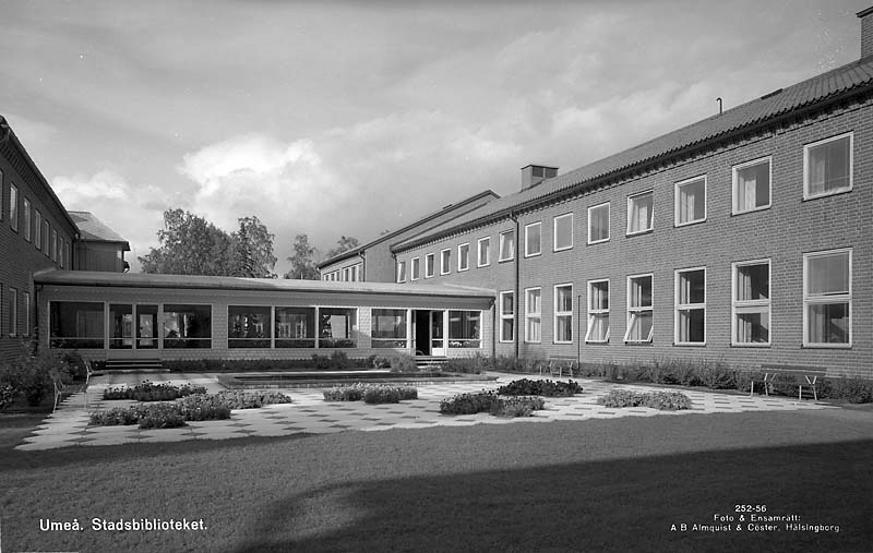 Stadsbiblioteket.; Bibliotek; Byggnadsverk; Utbildning och vetenskap